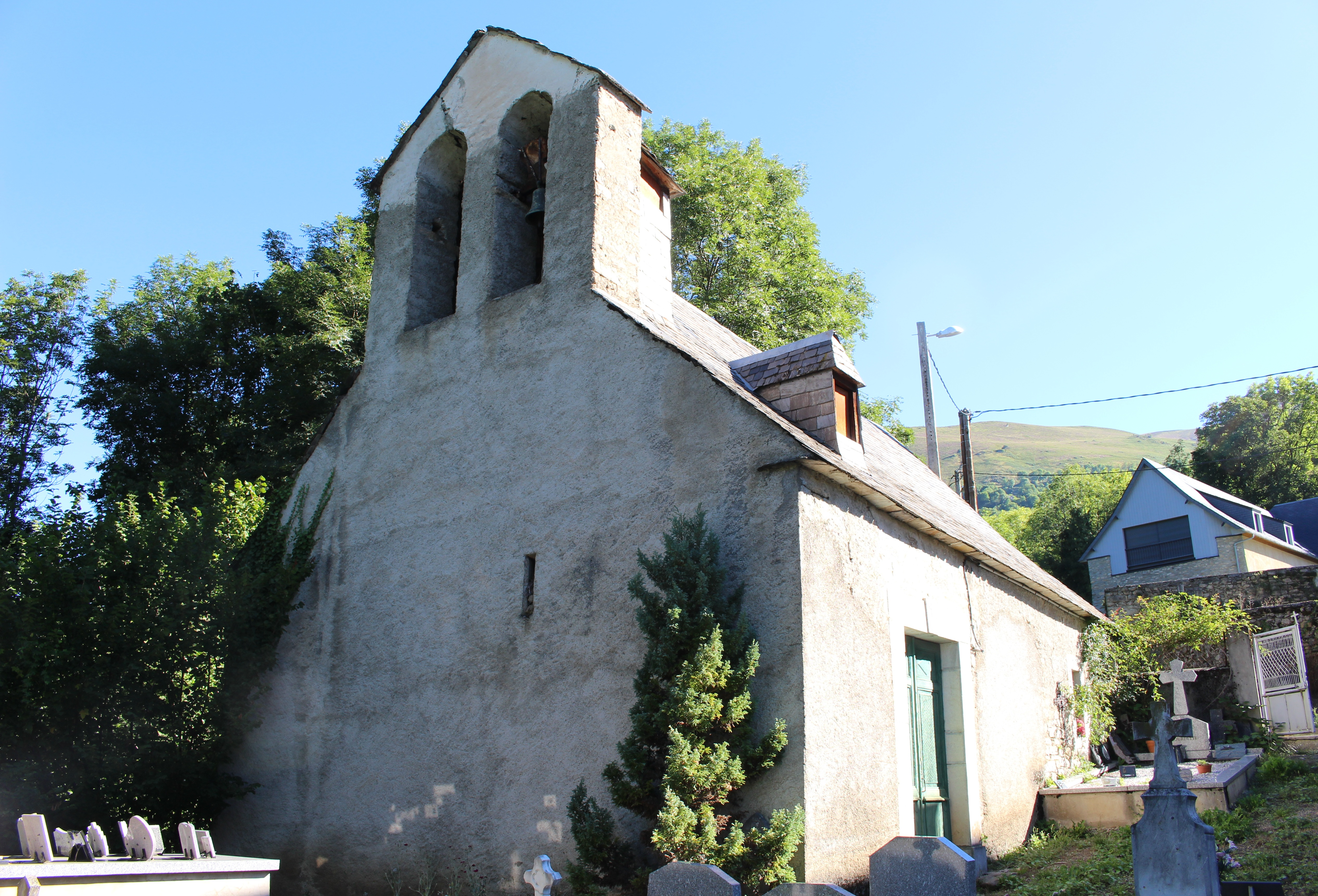 Église Saint-Jacques de Camors (Hautes-Pyrénées)